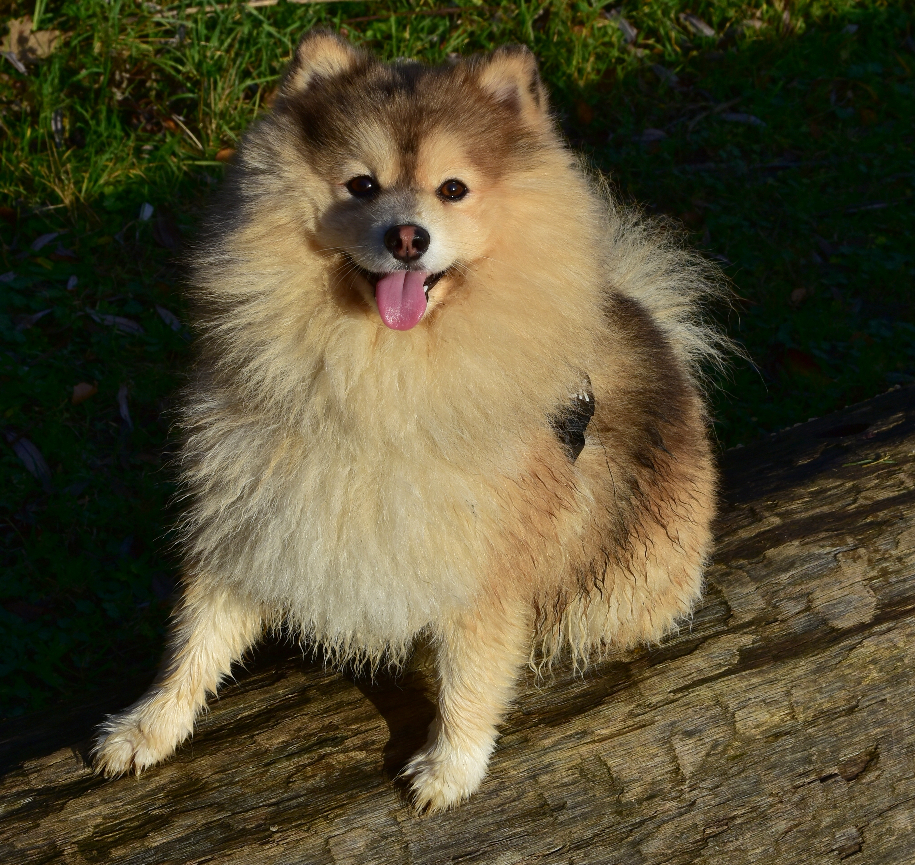 Pomsky - Gentbrugge 17-12-2019 13-52-013